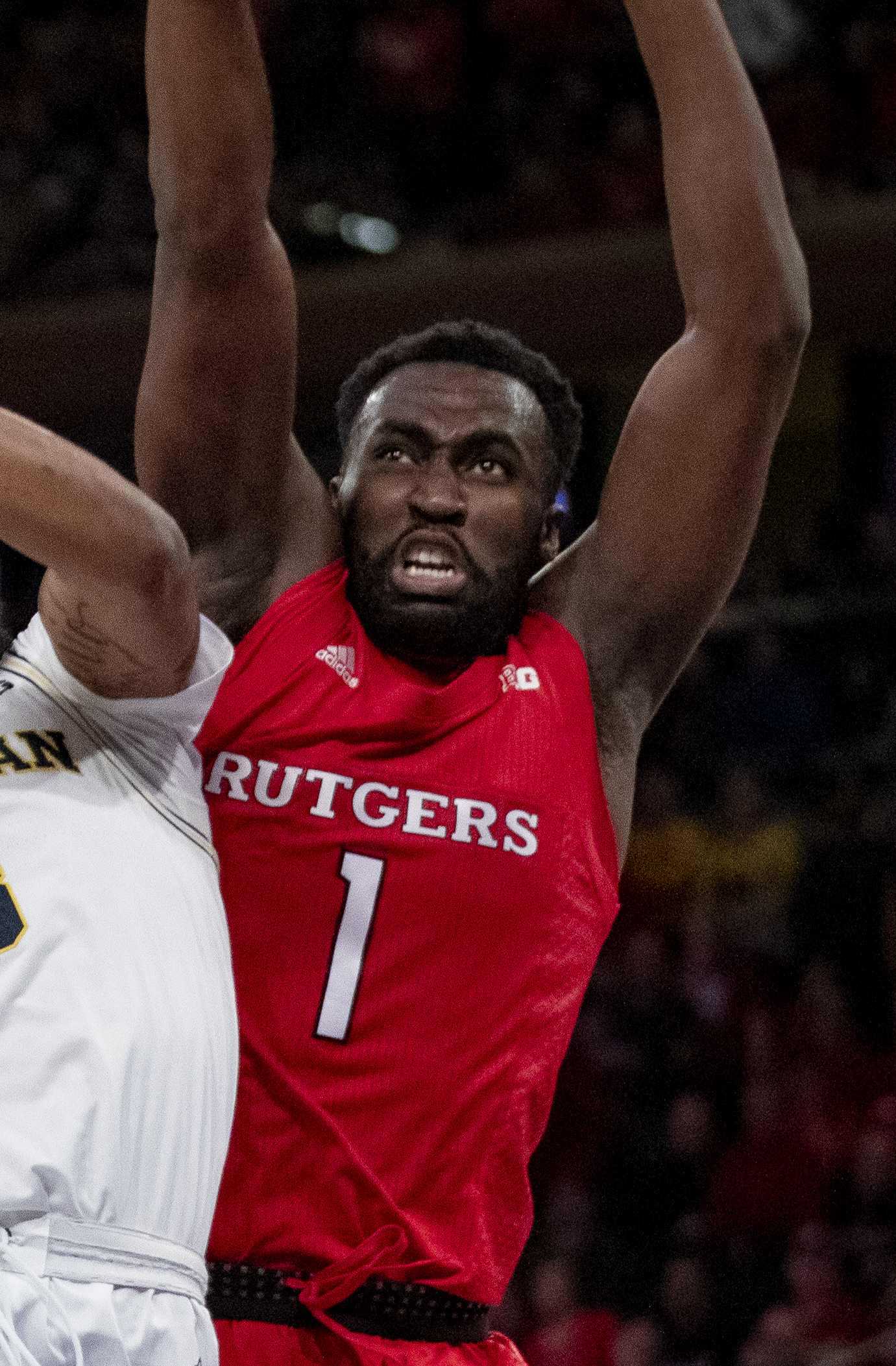 _O6A2560